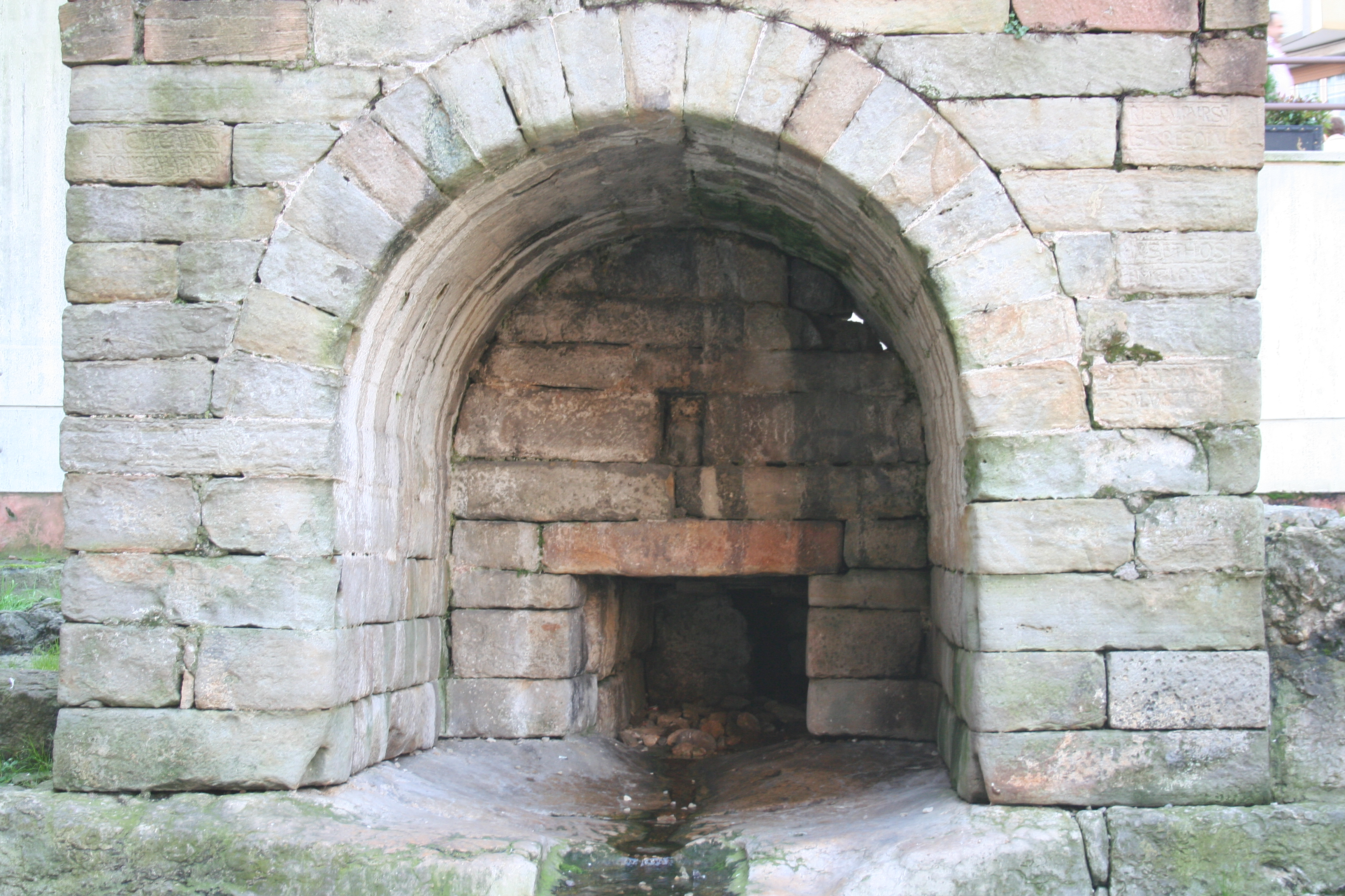 Interior duente de foncalada